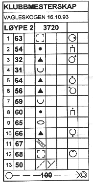 Postbeskrivelse som brukes i orientering.